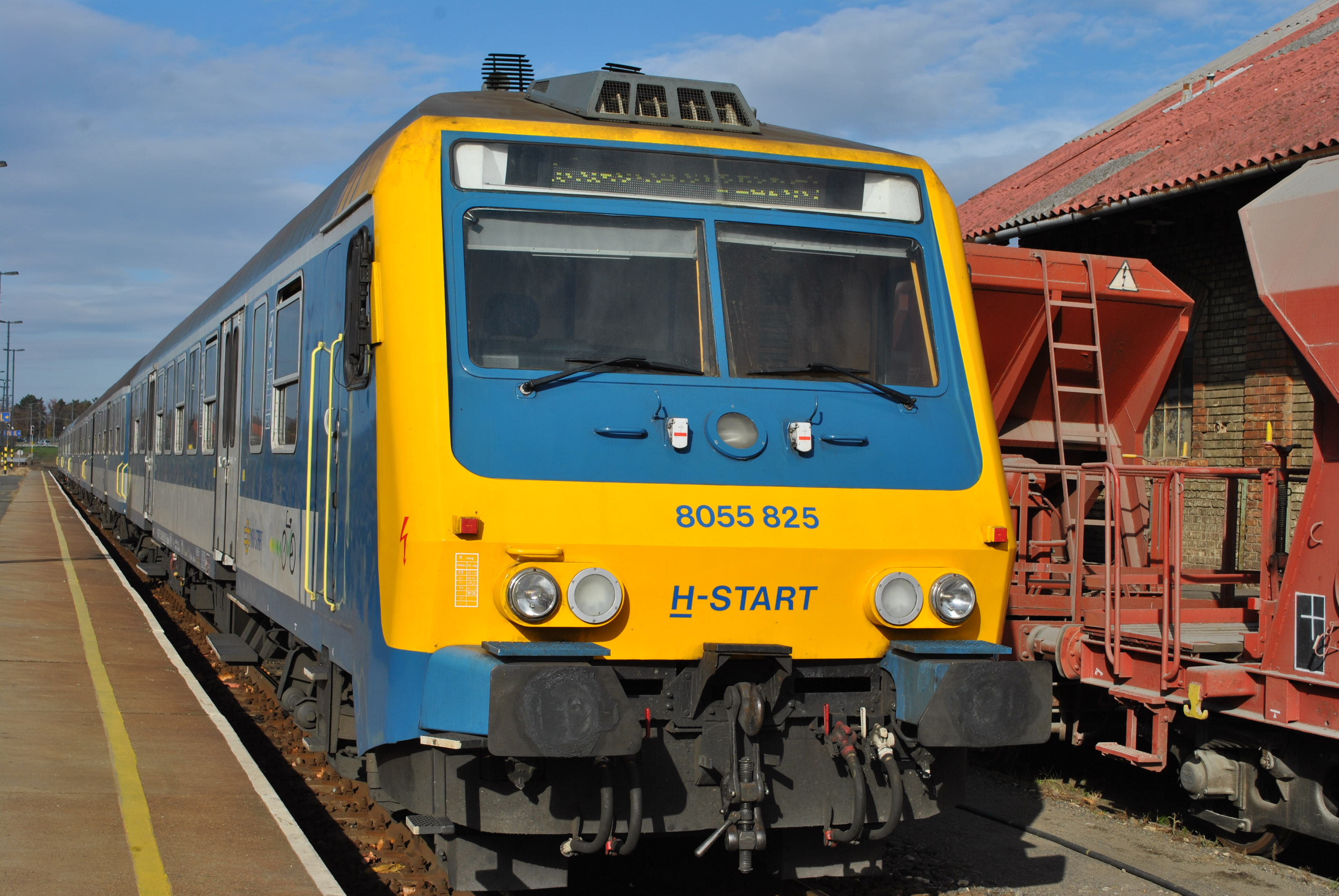 Tapolca